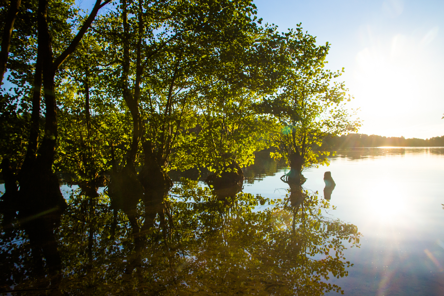 Sonnenuntergang am Neumühler See bei Friedrichsthal